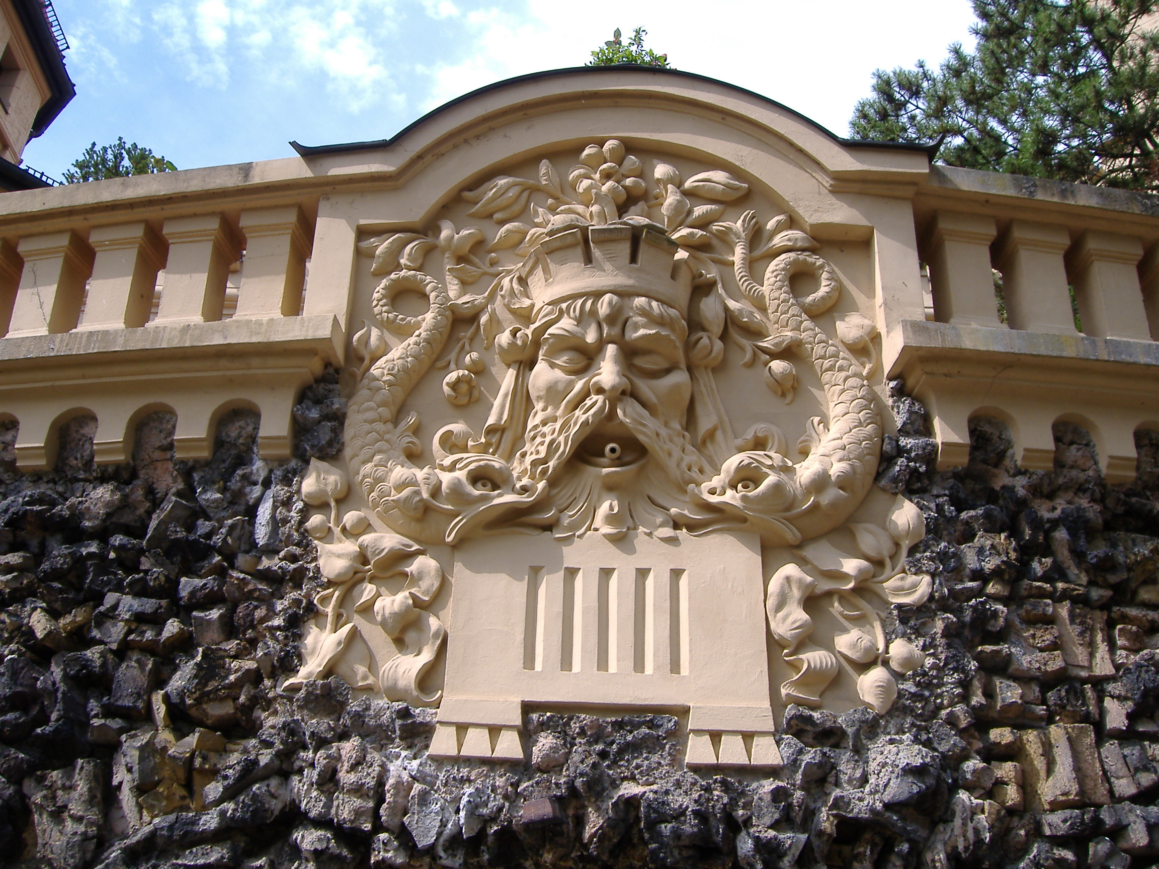 Hessingburg Augsburg-Göggingen